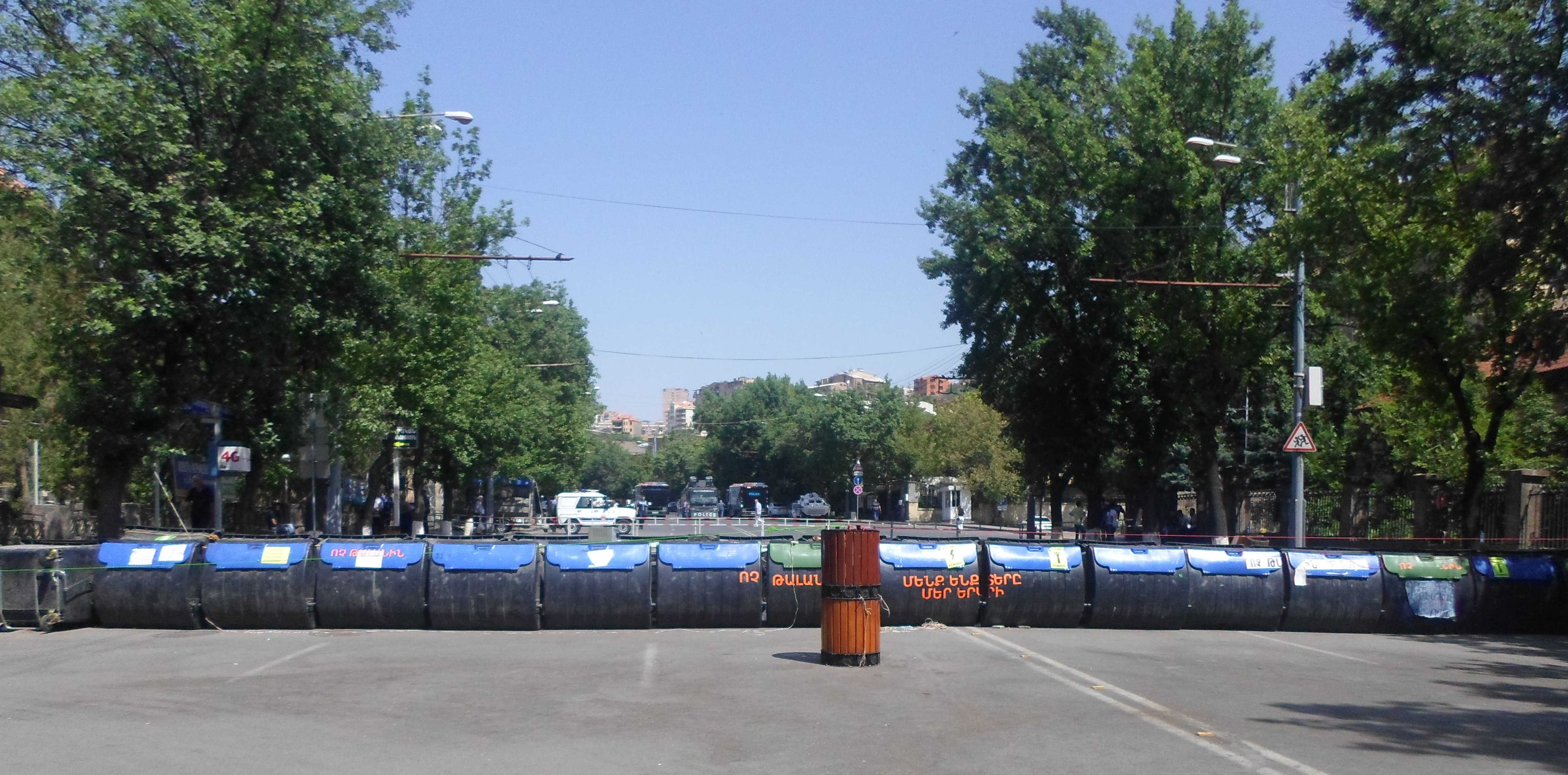 Баррикады на проспекте Баграмян